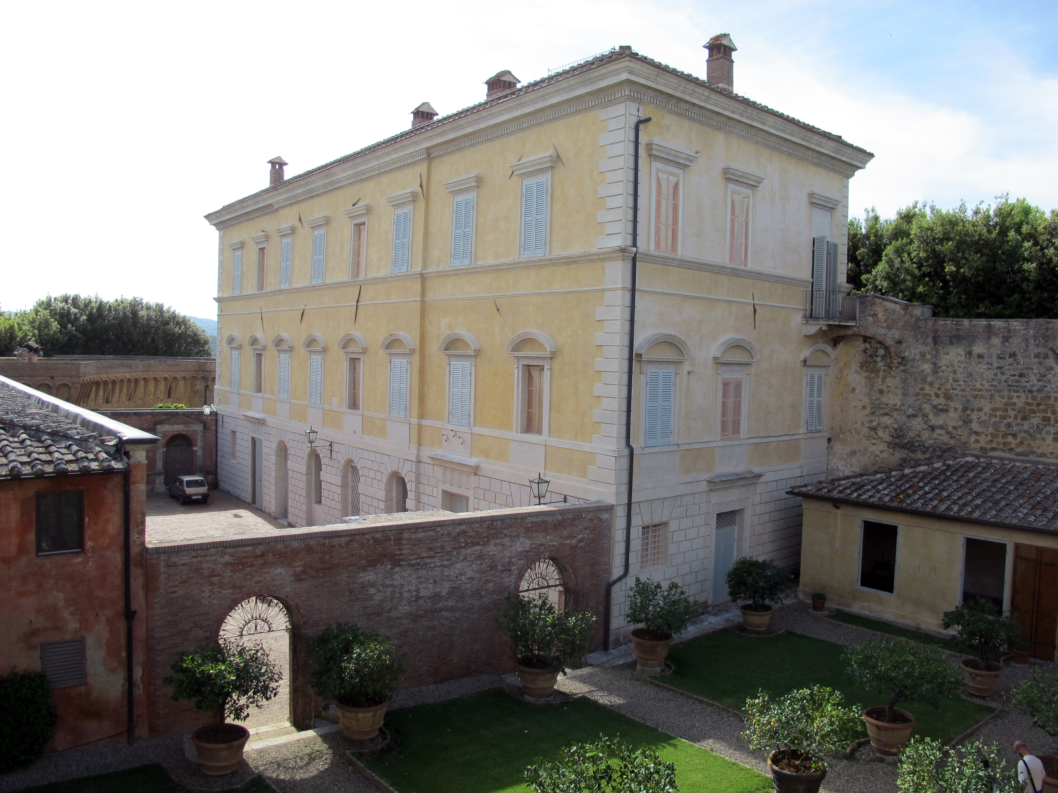 Castello di Belcaro, Siena